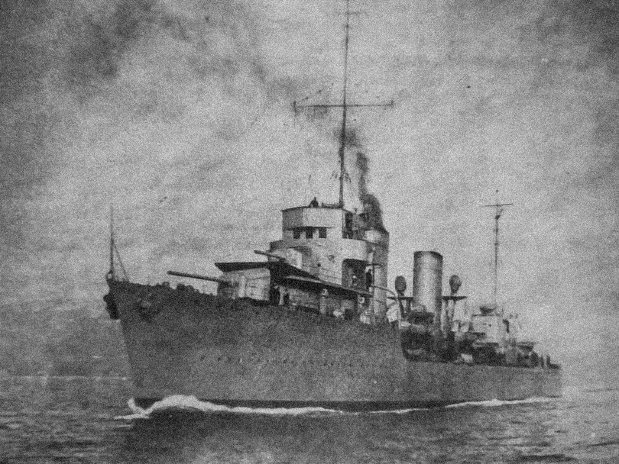 Вођа флотиле Дубровник на путу за Југославију Description The leader of the "Dubrovnik" flotilla on his way to YugoslaviaDate May 1932Source Mile Bjelajac, Vojska Kraljevine SHS/Jugoslavije: 1922-1935 ISBN: 8670050072Author Unknown/Royal Yugoslav Navy The leader of the "Dubrovnik" flotilla on his way to Yugoslavia